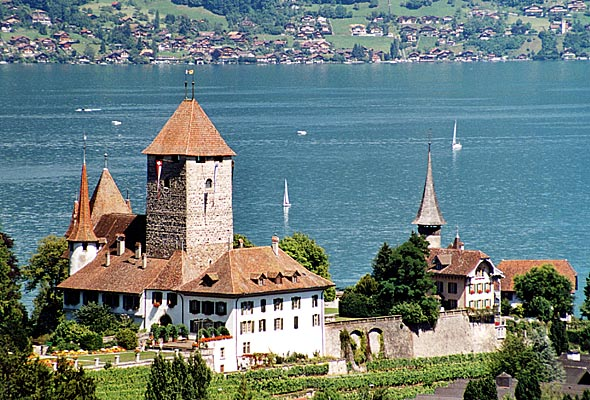 Das Schloss Spiez am Thunersee